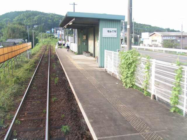 福島口駅 投稿者が撮影(2006/08/28)